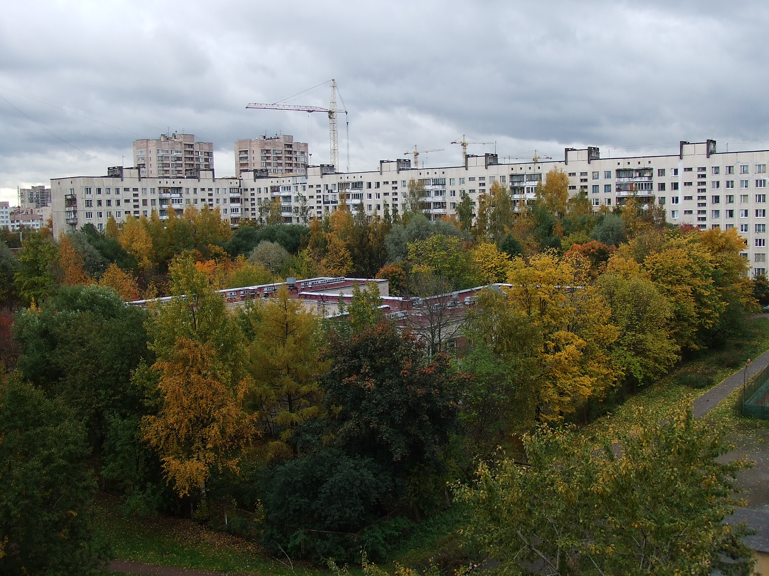 Осень во дворе